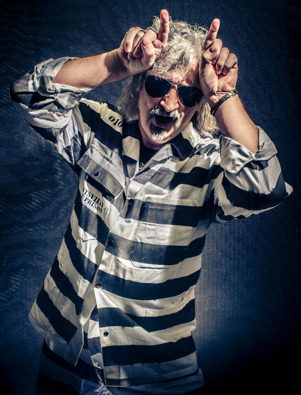 Das unverwechselbare Markenzeihen des Musikers ist seine Sträflingskleidung, welche er als Bühnenoutfit verwendet